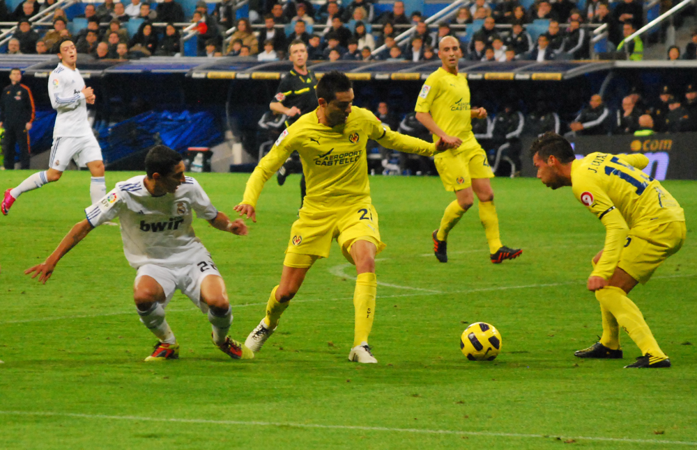 Real Madrid 4 - Villarreal 2 La Liga: 9 de Enero 2011